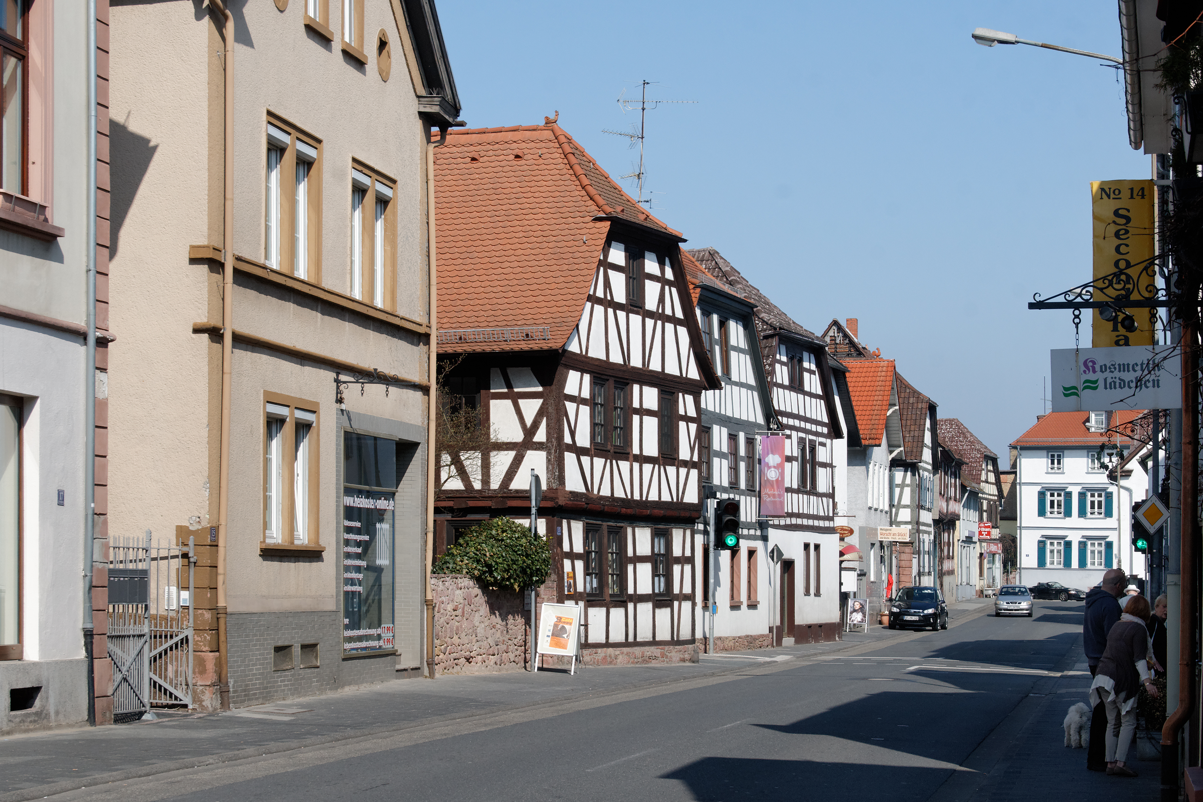 Fahrgasse in Langen (Hessen), Ortsdurchfahrt der Bundesstraße 3.